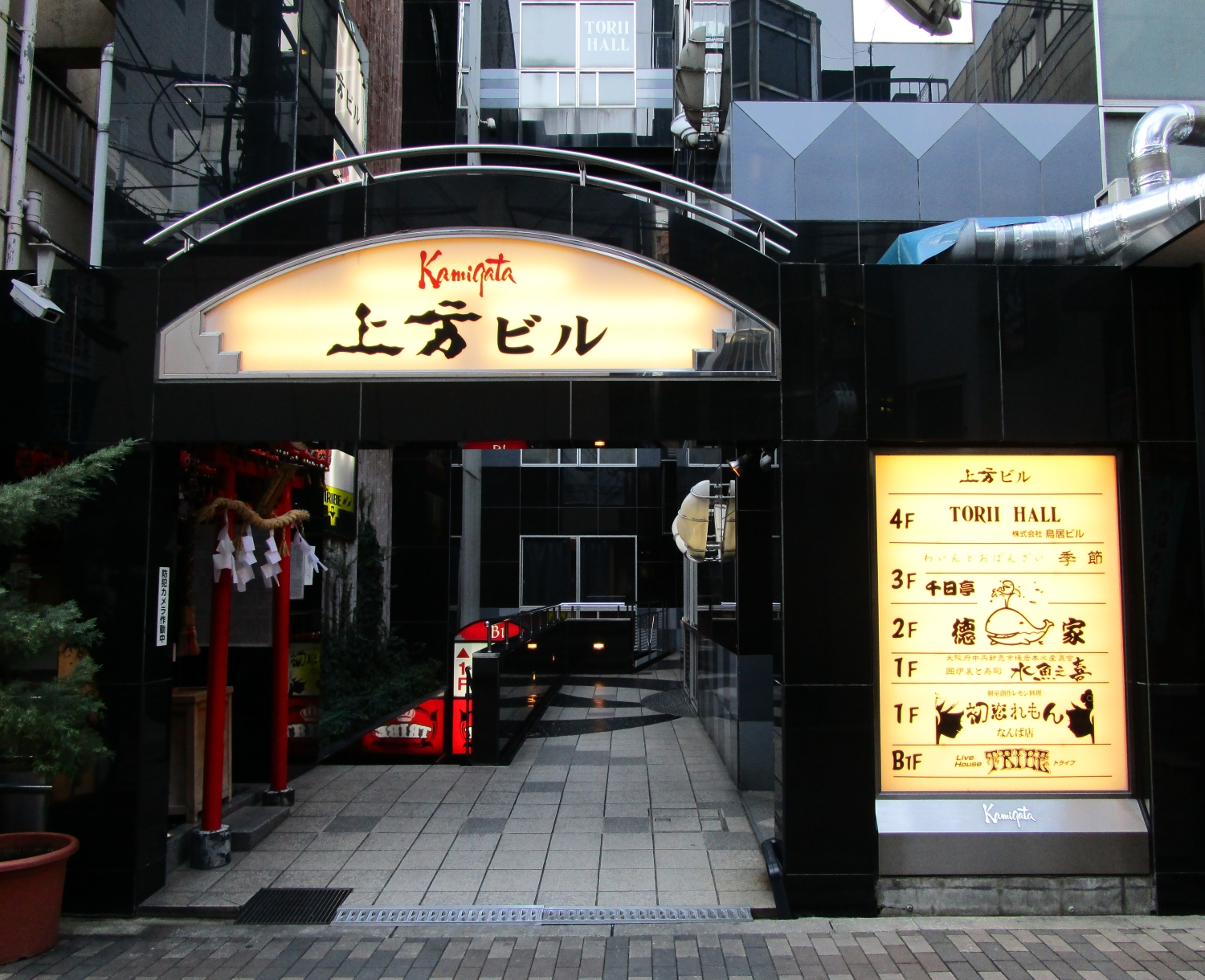 上方ビルの入り口